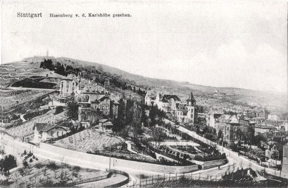 Stuttgart, Hasenberg. Postkarte.